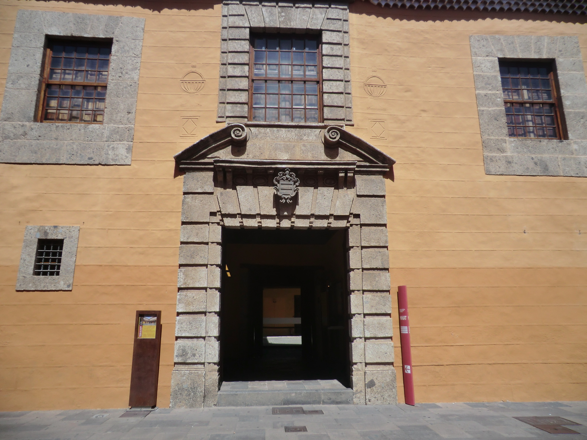 Rue San Agustín, San Cristóbal de La Laguna, Tenerife, Espagne. Maison d'influence italienne antérieure à 1566, ayant appartenu à Gaspar Justiniano, écrivain public, et classée monument en 2008. Musée d'histoire et d'anthropologie de Tenerife, Espagne.